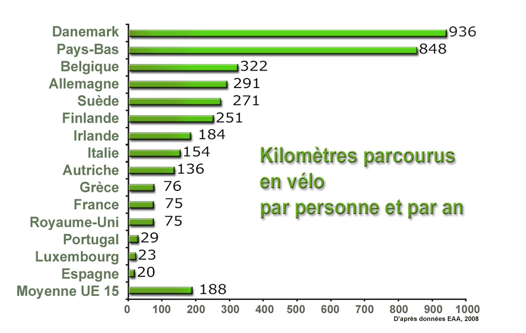 nombre de kilomètres parcourus en vélo en europe (moyenne, par personnes et par pays)